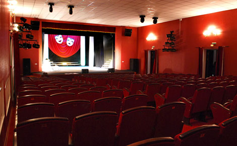 Київський академічний обласний музично-драматичний театр імені П. К. Саксаганського